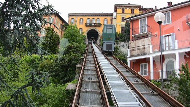 Biella - funicolare per il Piazzo (veduta dal basso)